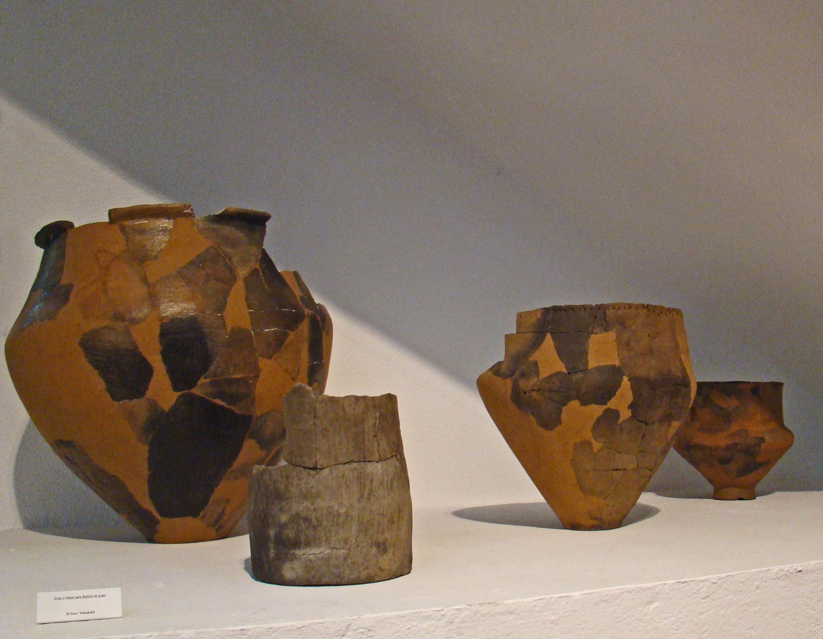 Varias piezas de cerámica encontradas en el sitio arqueológico del Soto de Medinilla al norte de la ciudad de Valladolid (España). Museo de Valladolid en el palacio de Fabio Nelli.